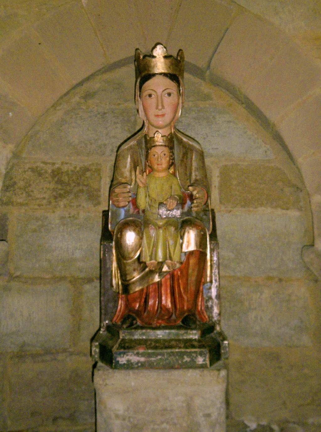 Talla románica de la Virgen de Eunate, en la Ermita de Santa María de Eunate (Muruzábal, Navarra)